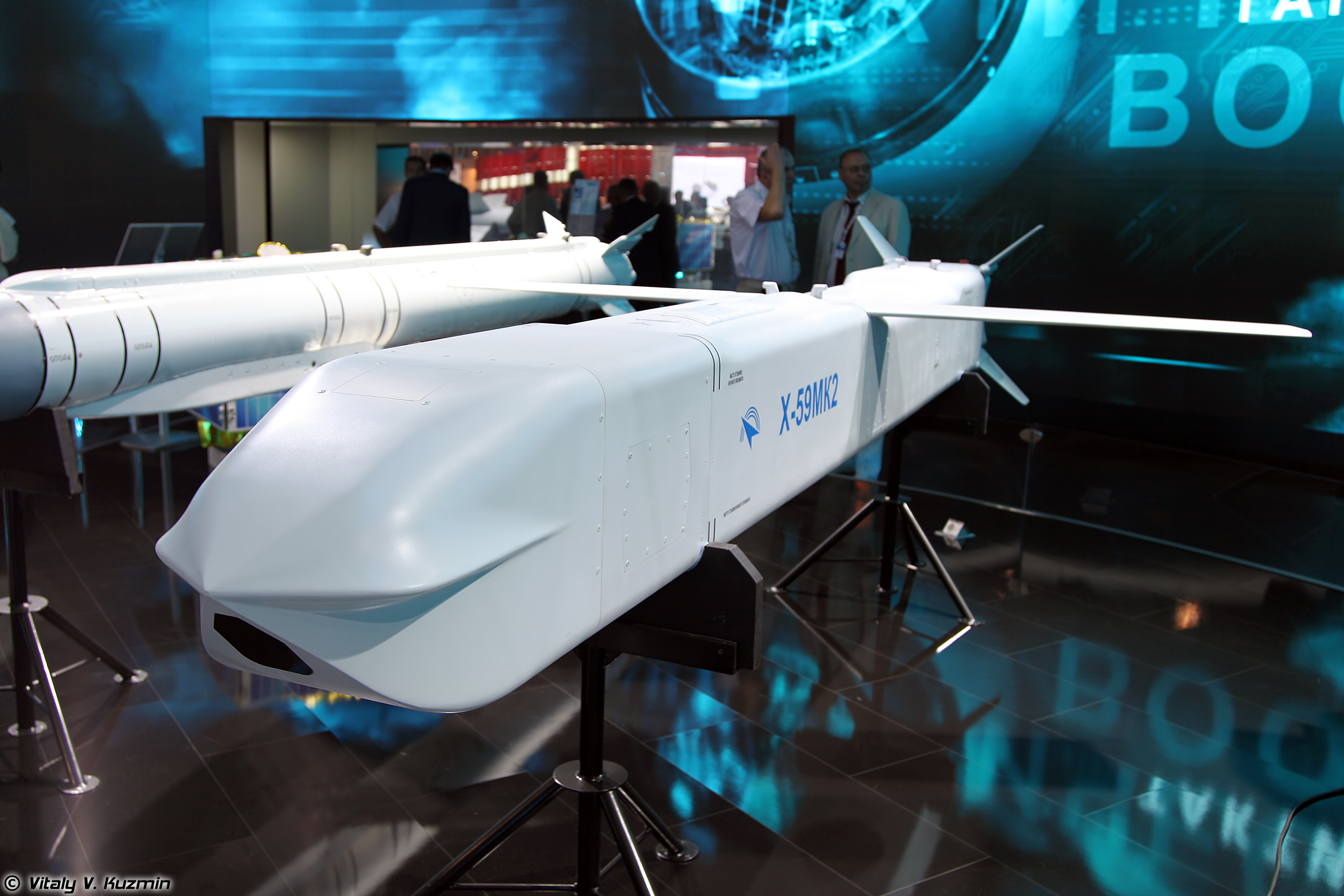 Авиационная управляемая ракета Х-59МК2